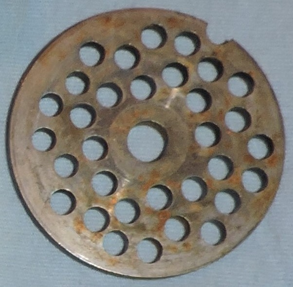 Lochscheibe eines Haushaltswolfs